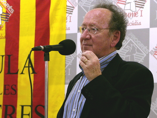 valencian humanist Joan Francesc Mira in L'Alcúdia